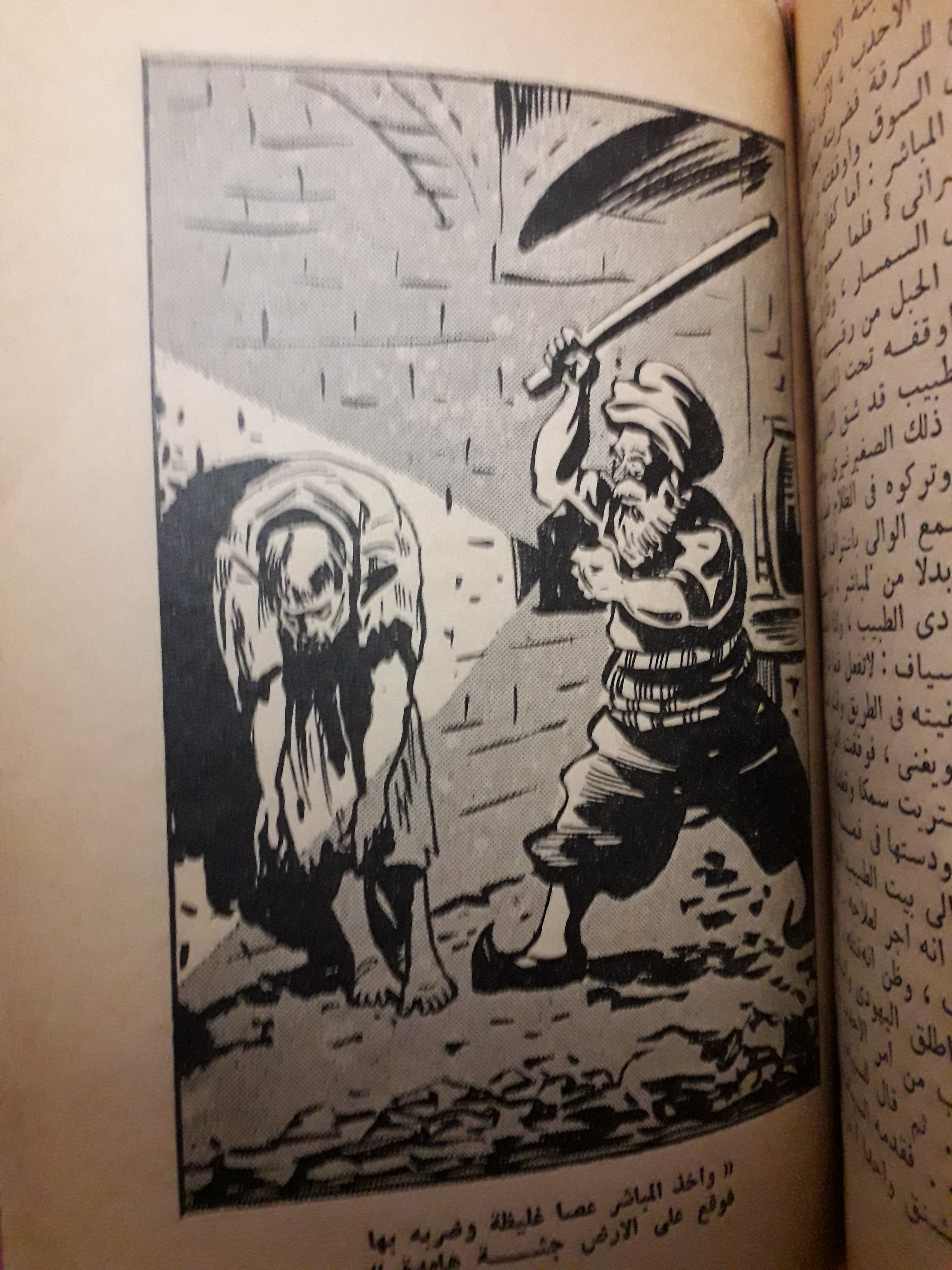 كتاب ألف ليلة وليلة (1955) الجزء الأول صفحة 217